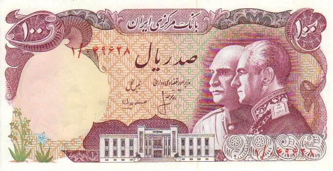 Իրանի հոբելյանական «Հարստության 50-այակը» 1976 թվականի 100 ռիալի թղթադրամի վրա առաջին և երկրորդ Փահլավիները